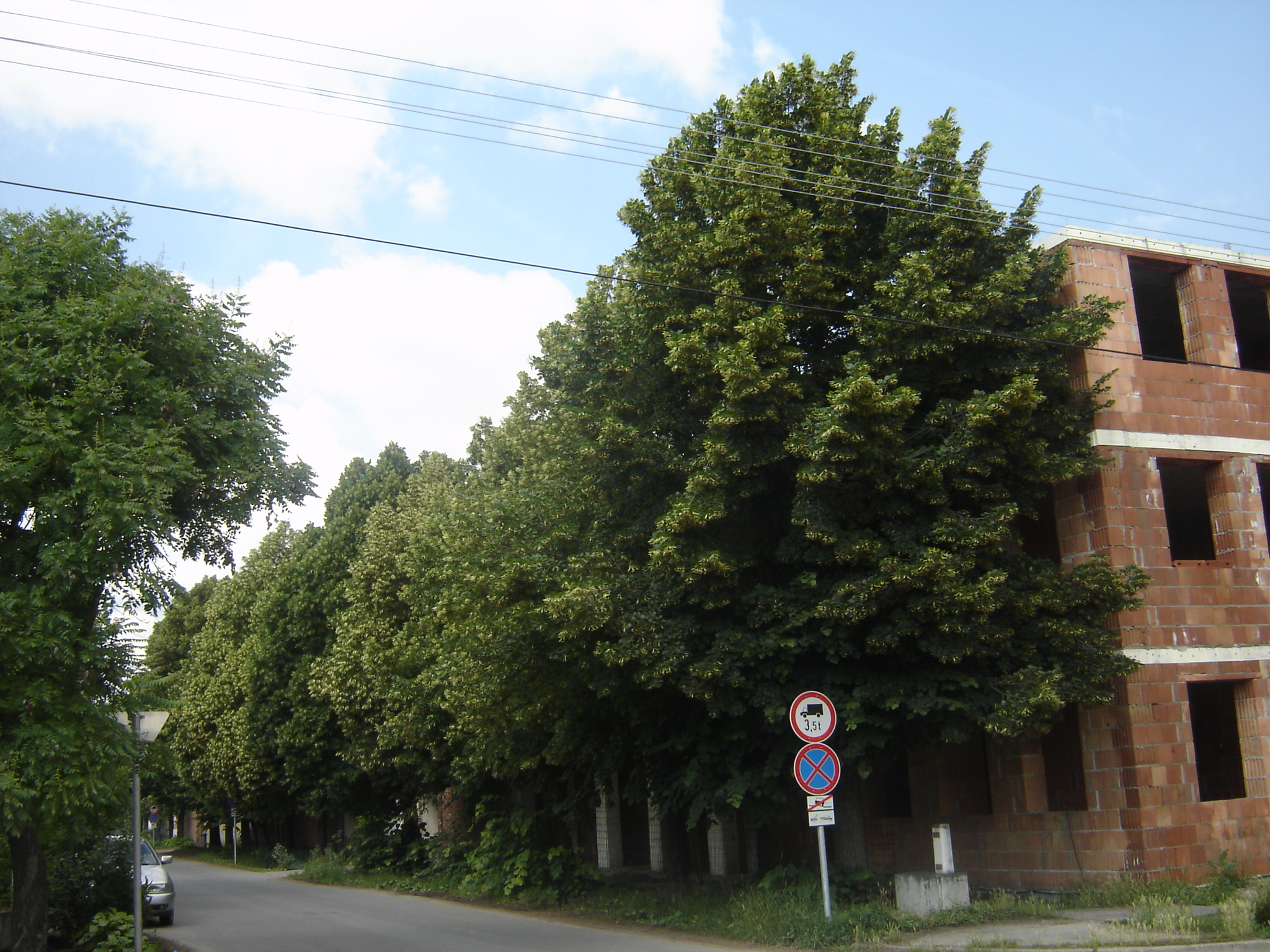 Épülő társasház Bálint Sándor szülőházának telkén (Szeged-Alsóváros, a Pálffy utca és a Csonka utca sarka)